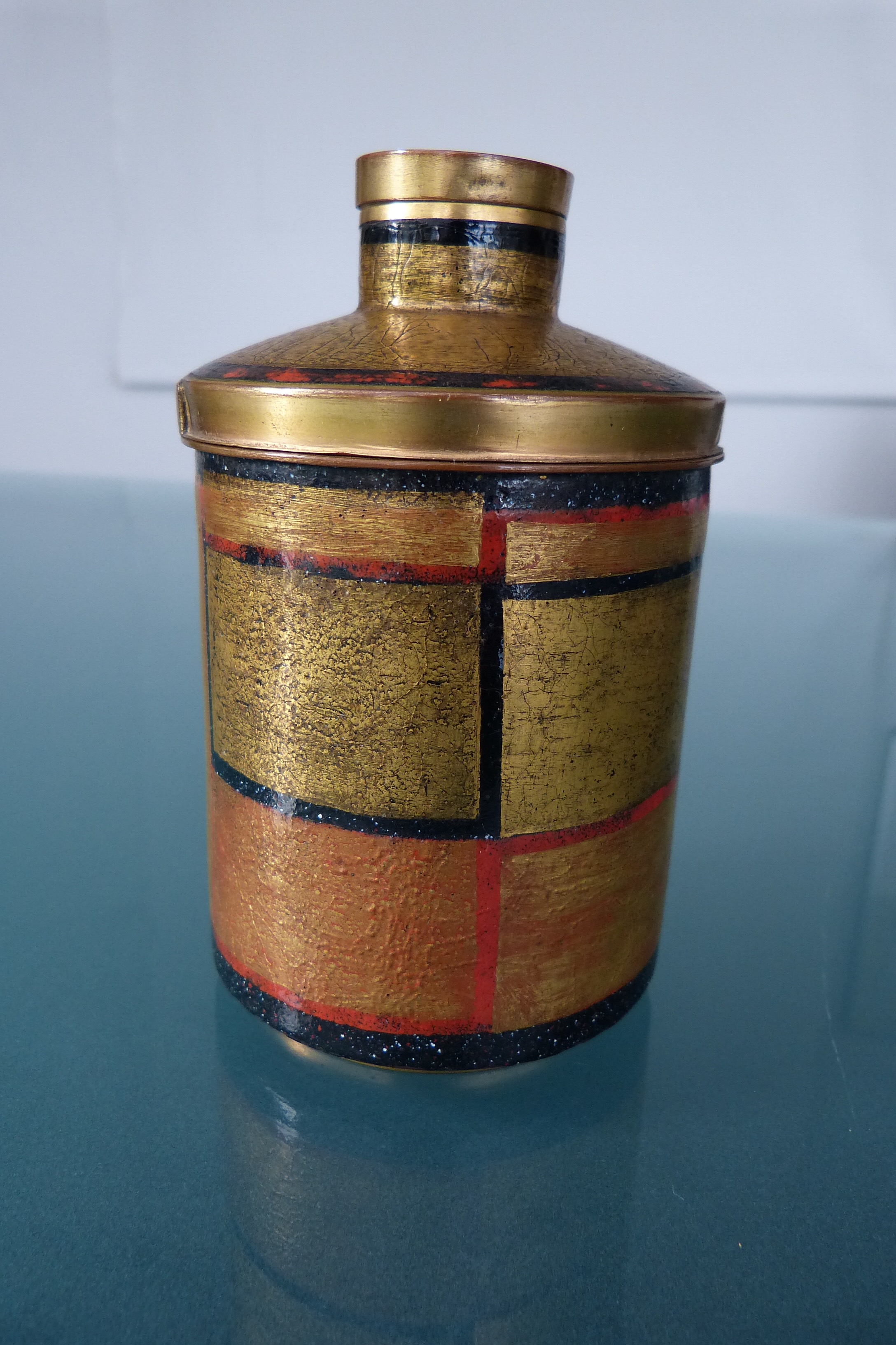 Teedose, gestaltet 1924 von Hans Warnecke und Erica Habermann in ihrem Atelier in Pforzheim, Email und Gold